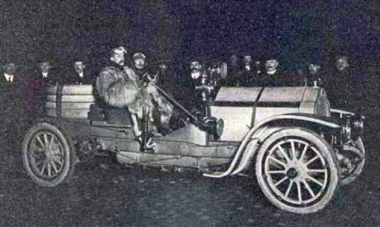 Marc Sorel en avril 1907 sur De Dietrich, après avoir rélié Nice depuis Paris en 16 heures et 15 minutes - La Vie au Grand Air du 20 avril 1907, p.276